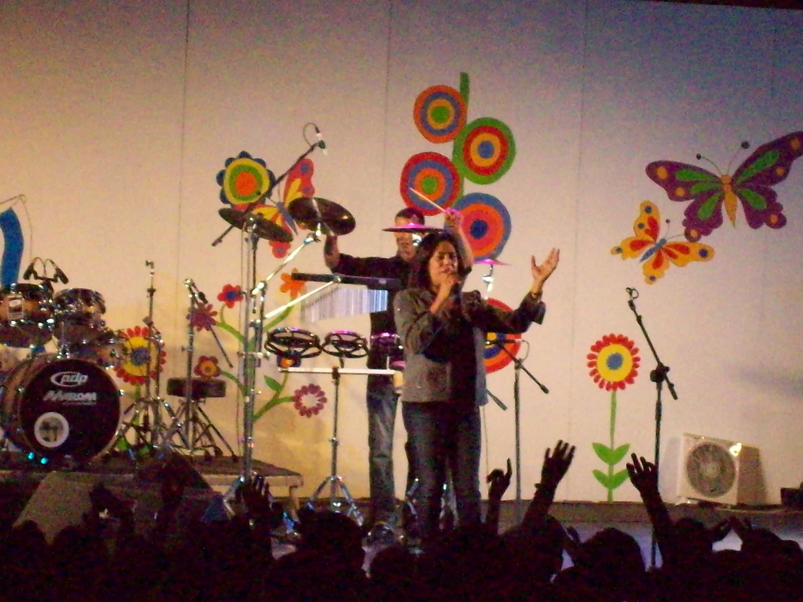 מרגלית צנעני שרה ברמת גן בחגיגות 62 שנה למדינת ישראל